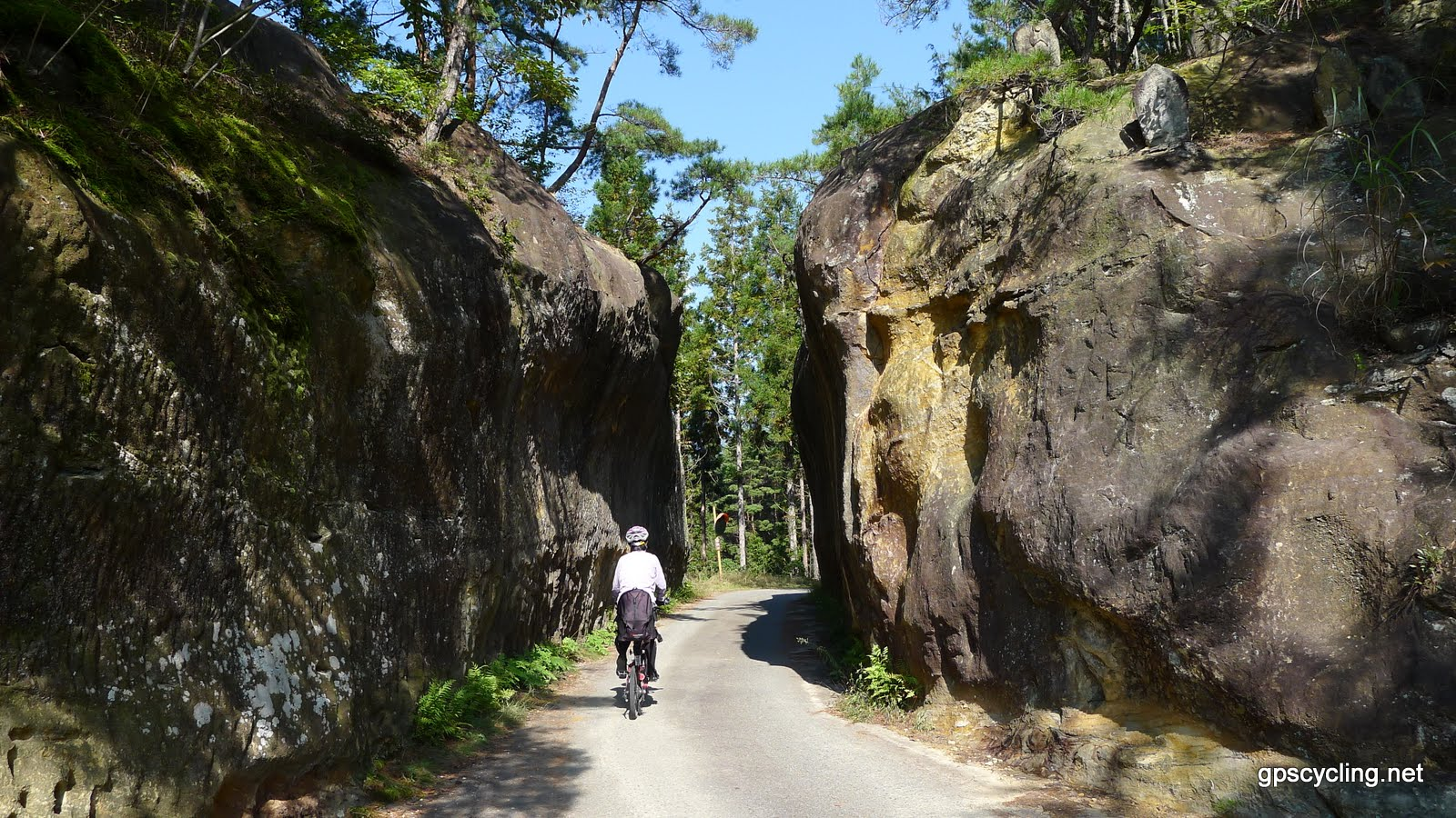 青柳宿切通し